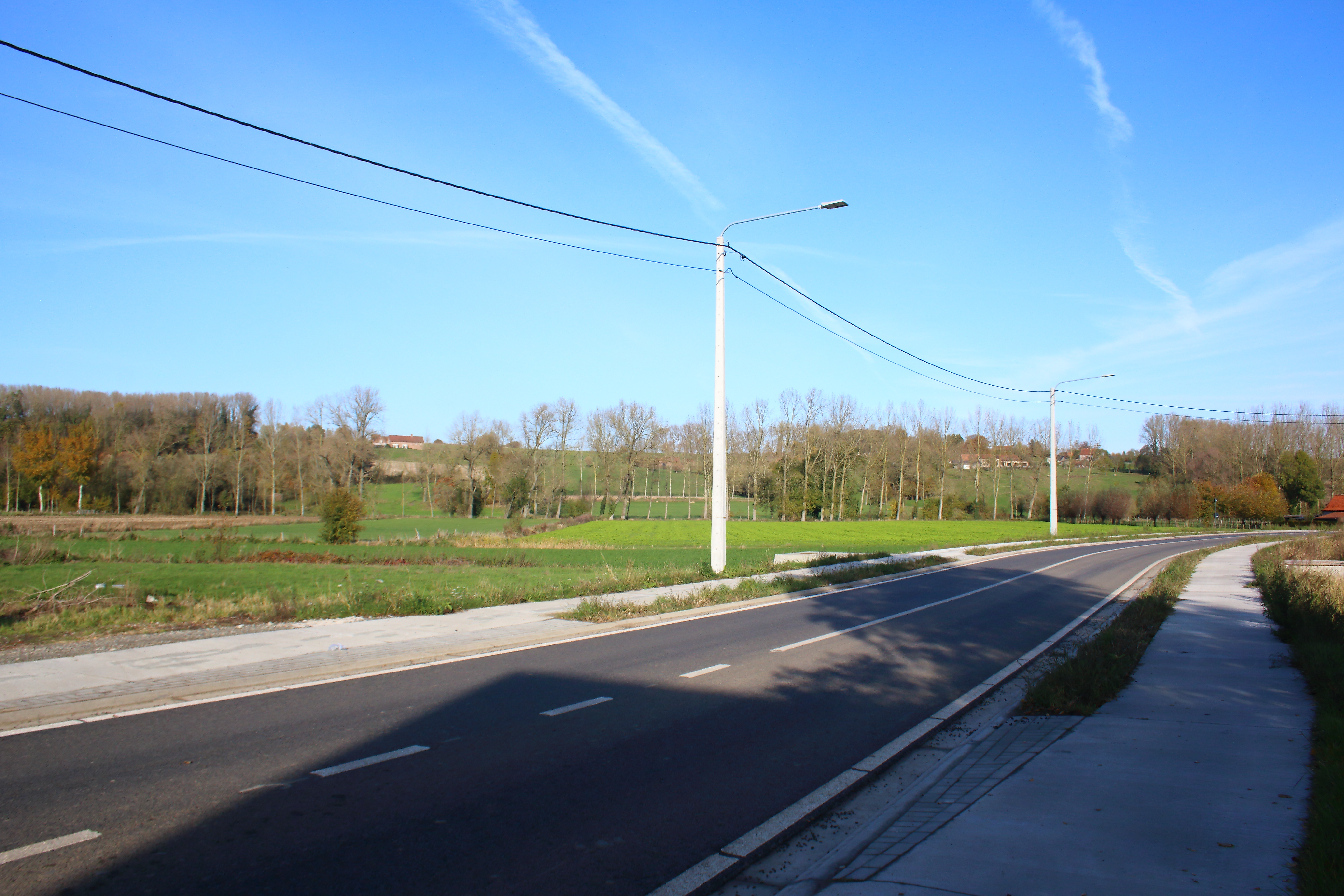 N457, Maarkedal, Vlaanderen, België